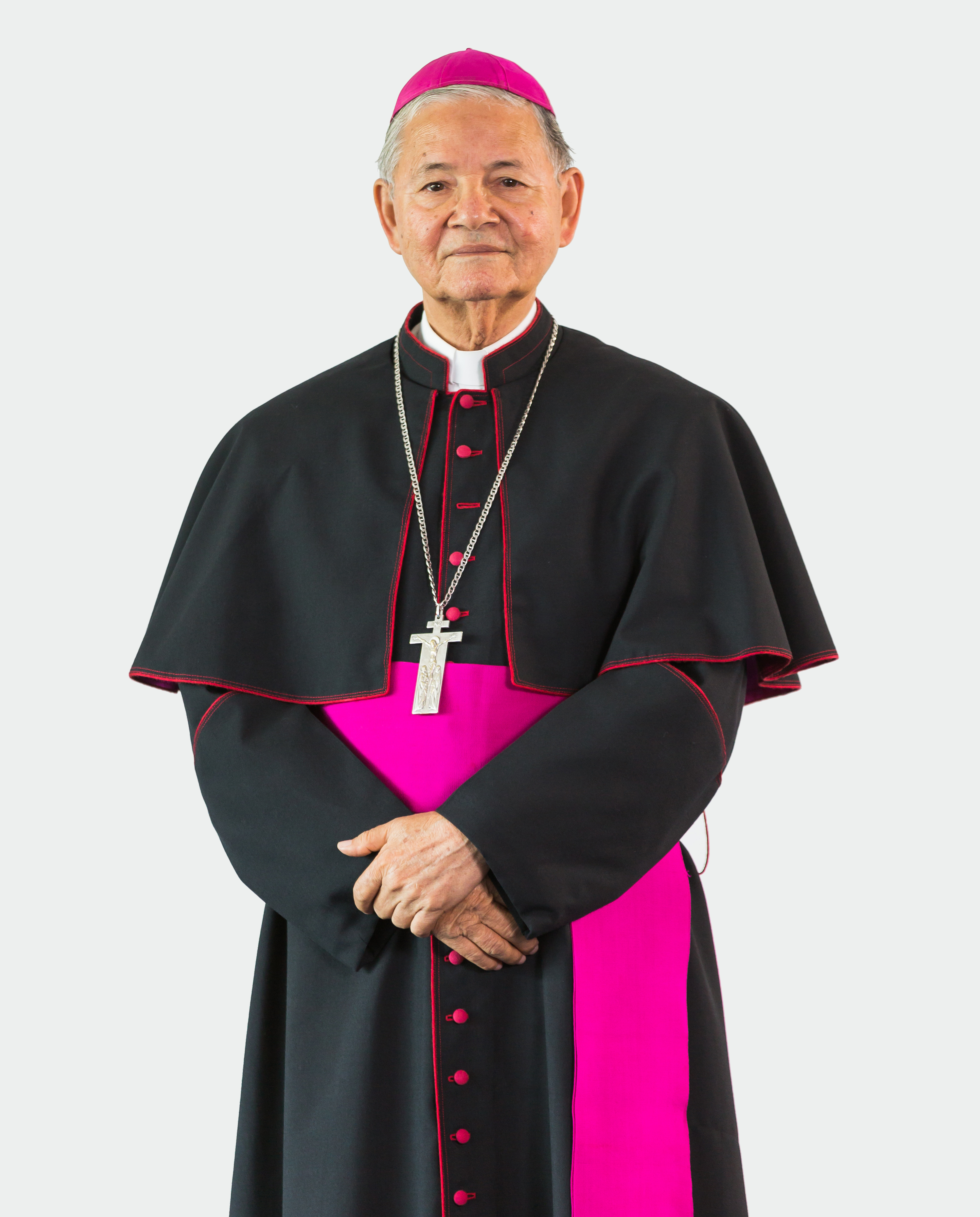 Obispo Pablo Cedano